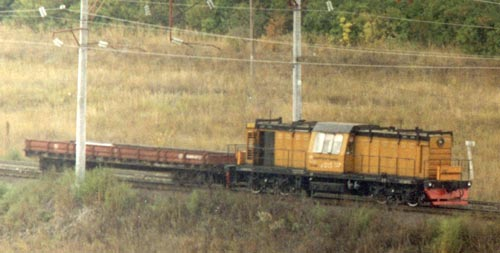 Универсальный тяговый модуль ТЭУ400 Багаевской ПМС с платформой на перегоне Буркин - Багаевка Приволжской железной дороги